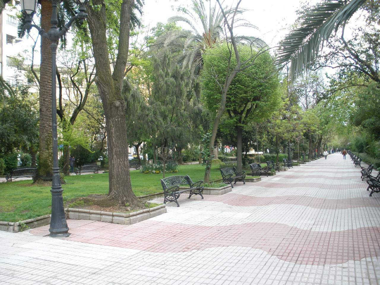 Cáceres - Paseo de Cánovas